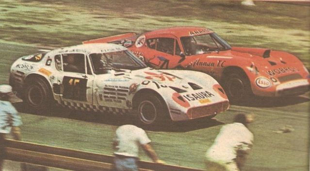 Carlos Marincovich (Chevitres) y Oscar Cabalén (Trueno Naranja), Turismo Carretera 1968.